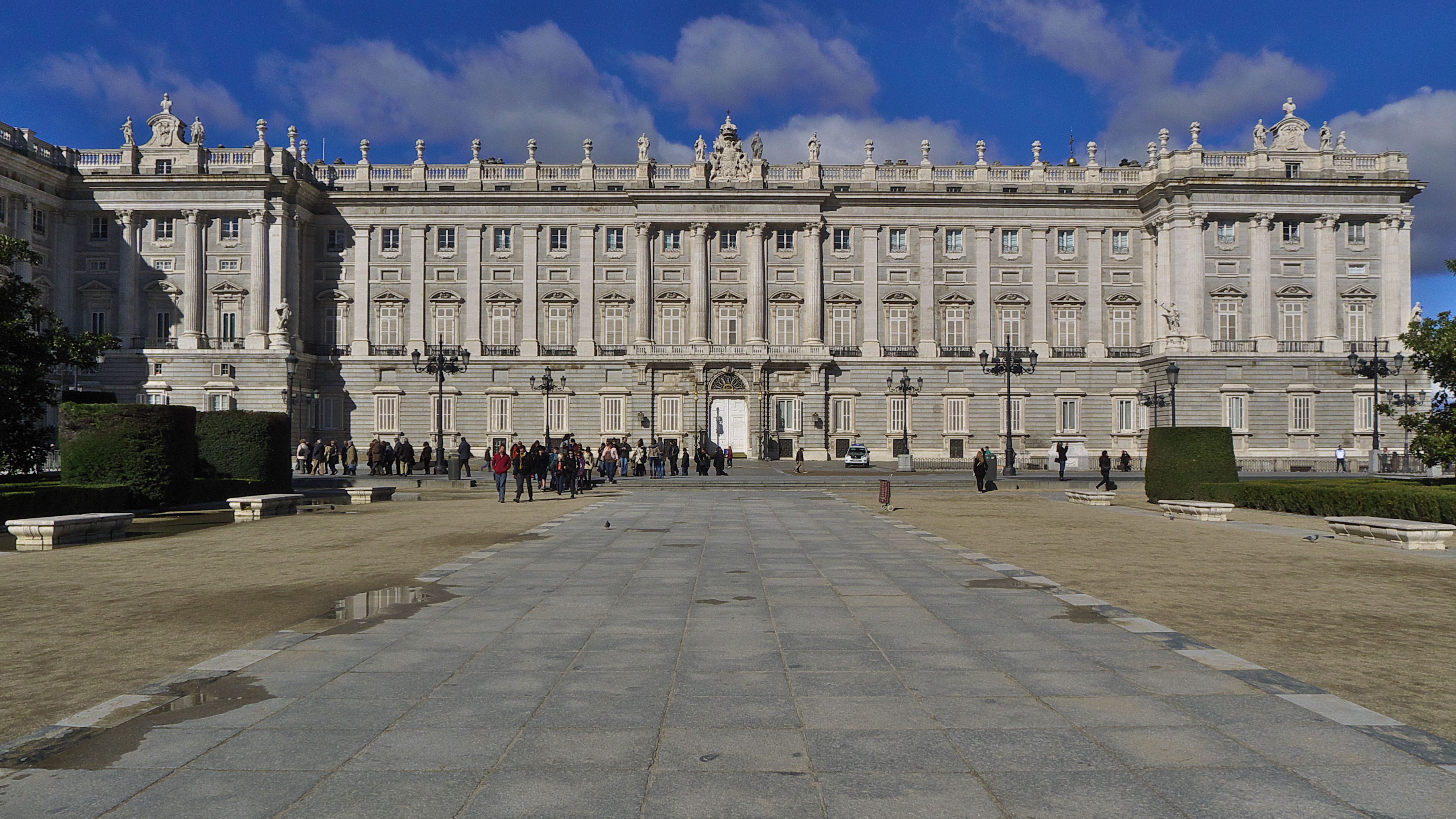 Fachada oriental del Palacio Real